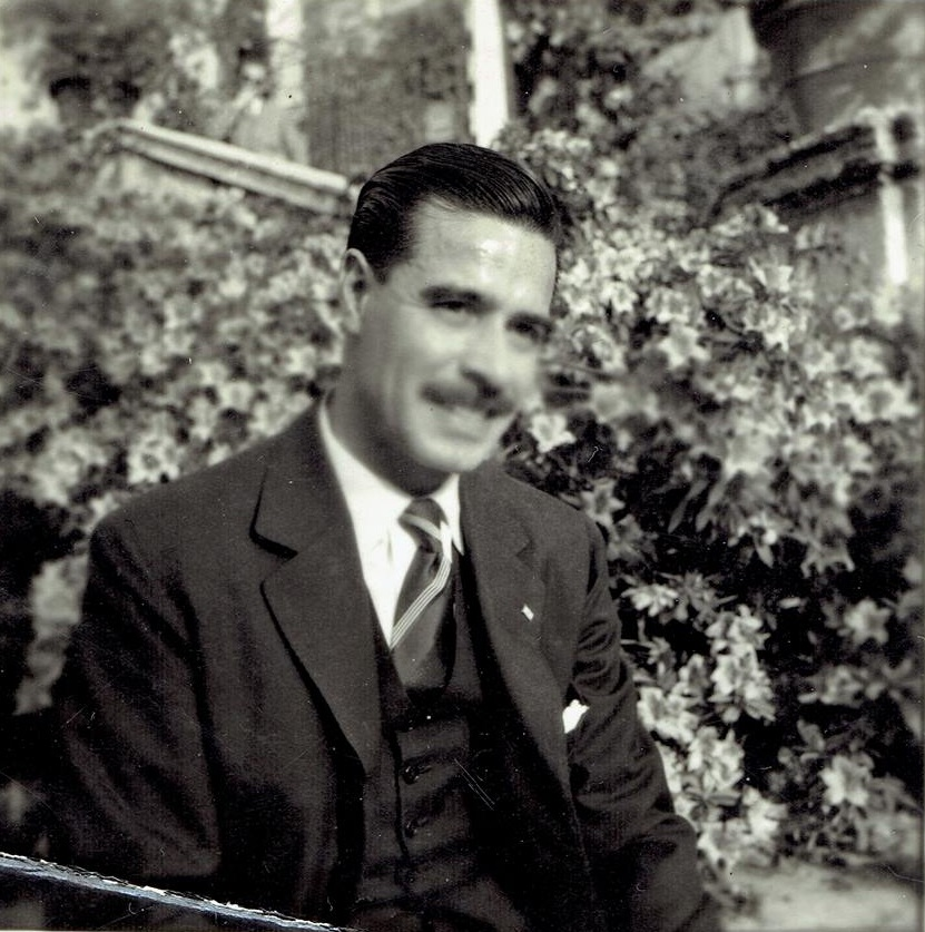 Edmundo Porteño Zaldívar (h.)